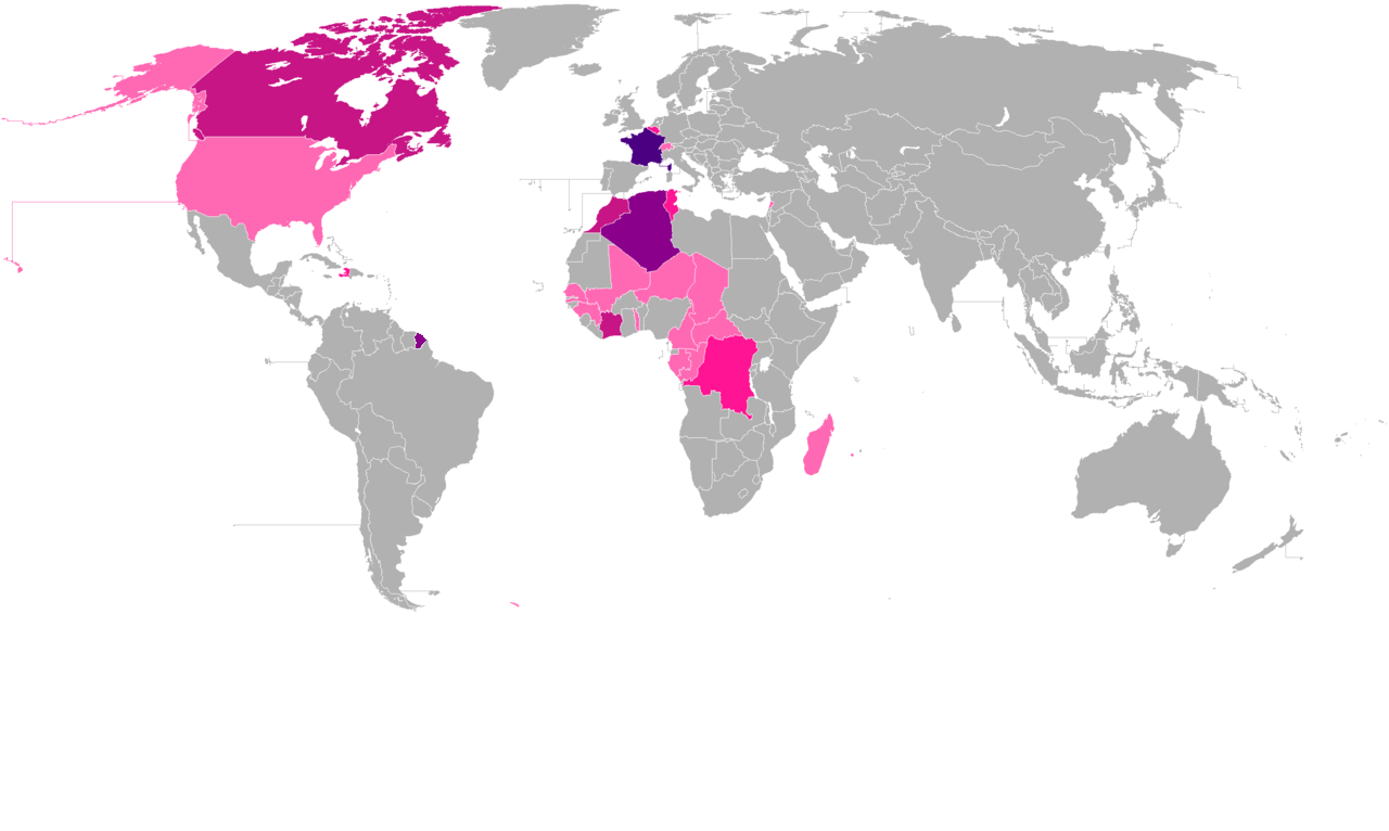 Más de 100 millones Más de 50 millones Más de 20 millones Más de 10 millones Más de 5 millones Más de 1 millón